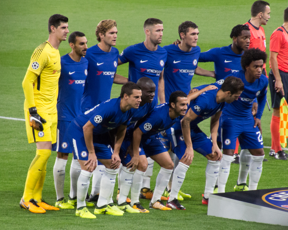 Champions League 12.9.17